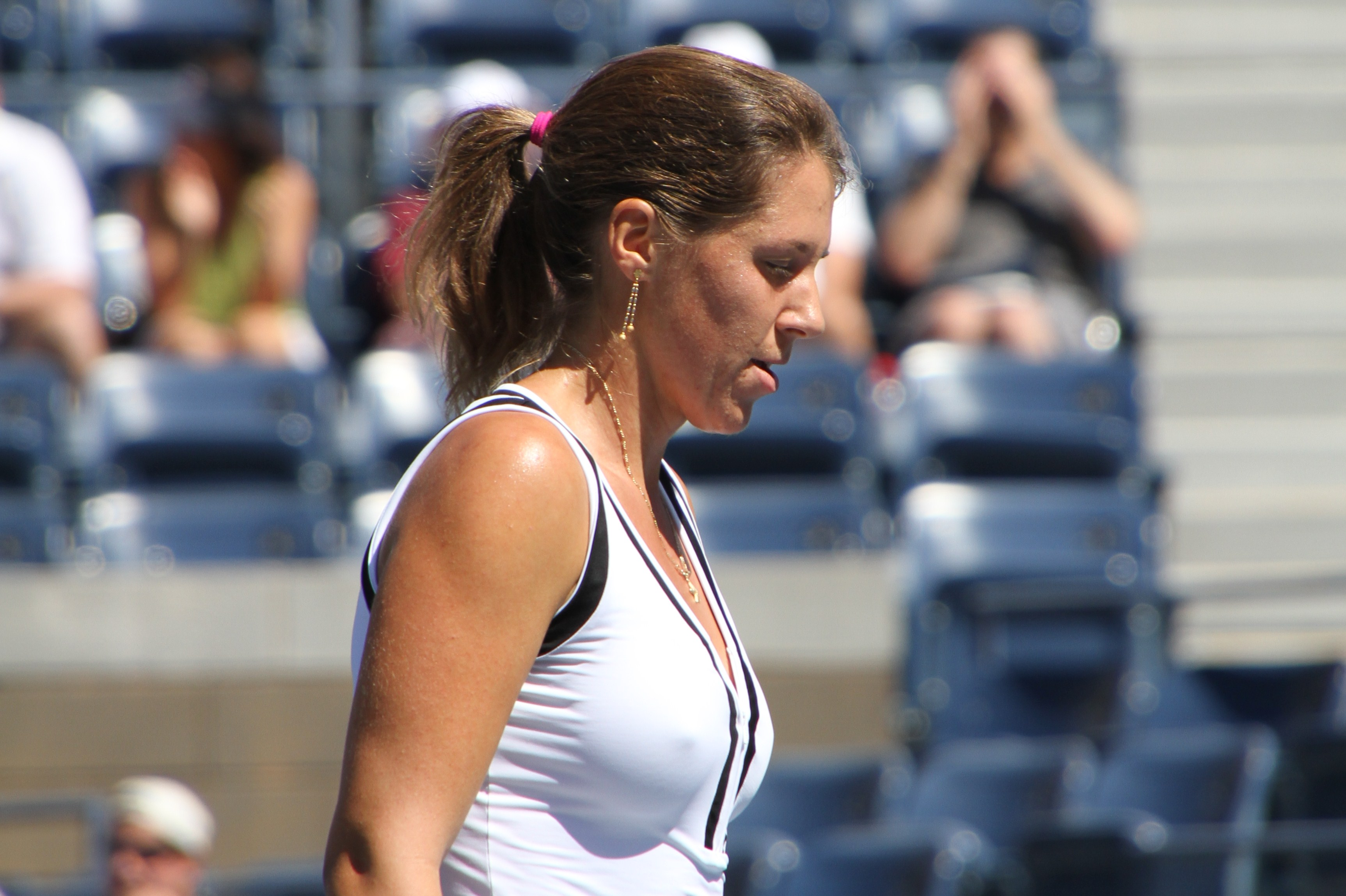 Olga Savchuk